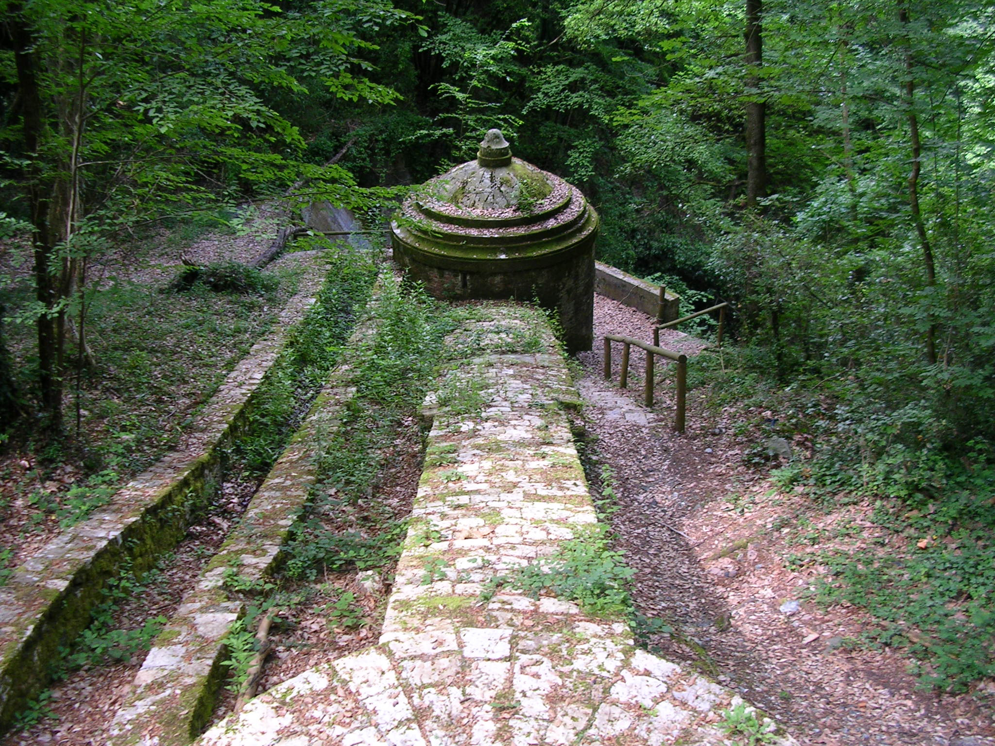 Colognole: sorgenti dell'Acquedotto di Colognole (Collesalvetti): l'acquedotto, costruito tra la fine del XVIII e la seconda metà del XIX secolo, ha rappresentato la principale risorsa idrica per la città di Livorno fino ai primi anni del Novecento.